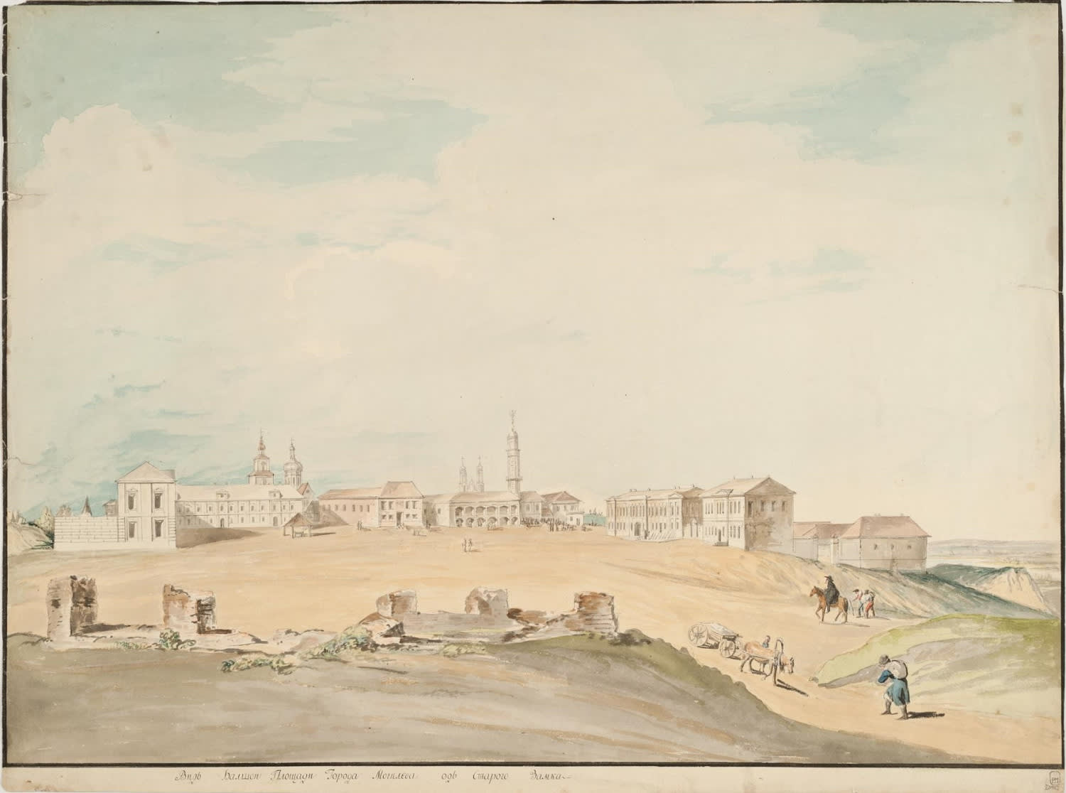 Беларуская (тарашкевіца): Магілёў (Mahiloŭ). Руіны замка і Рынак